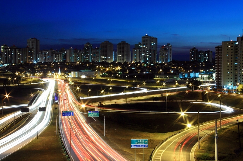 São José dos Campos, São Paulo, Brasil.